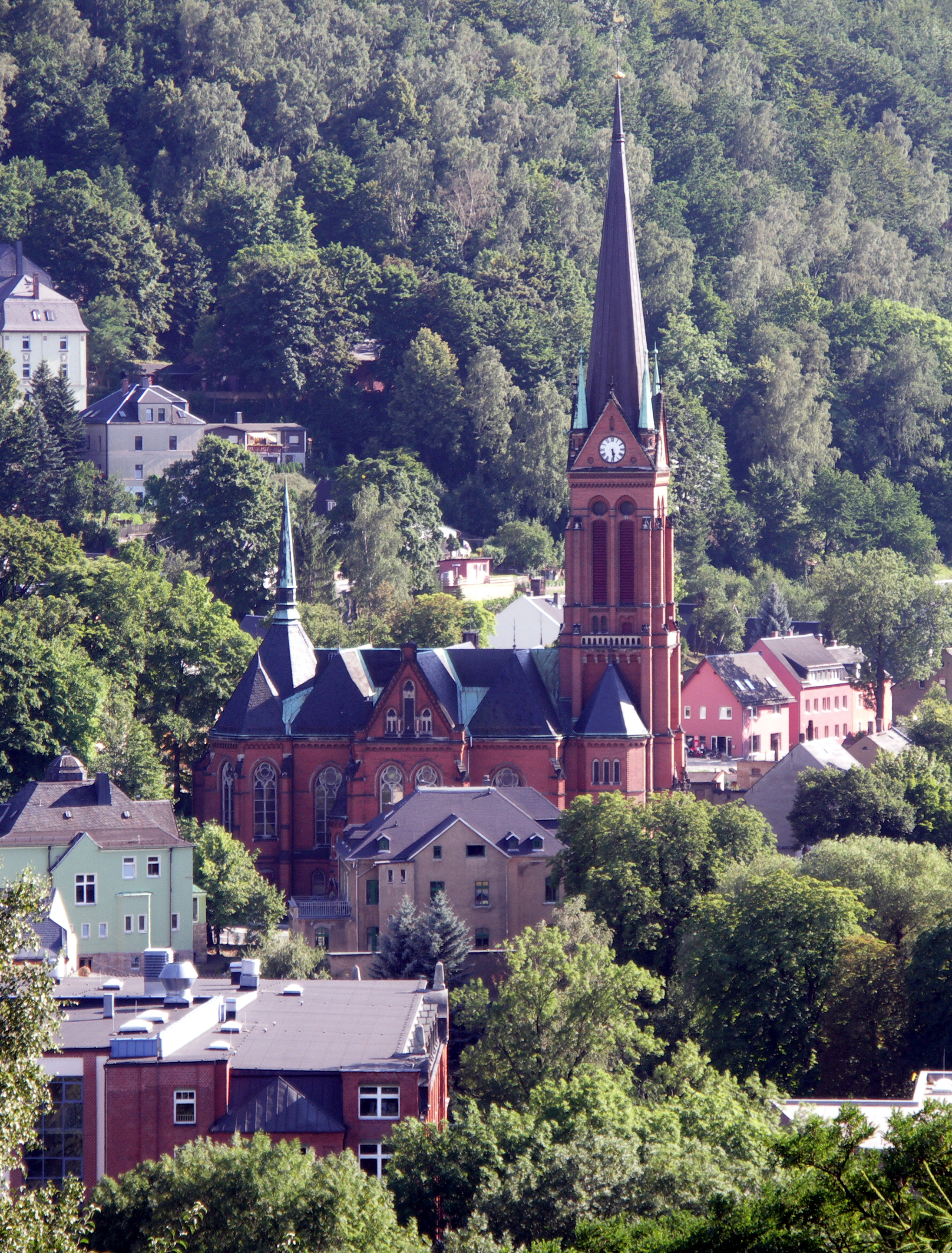 Aue, Nicolaikirche